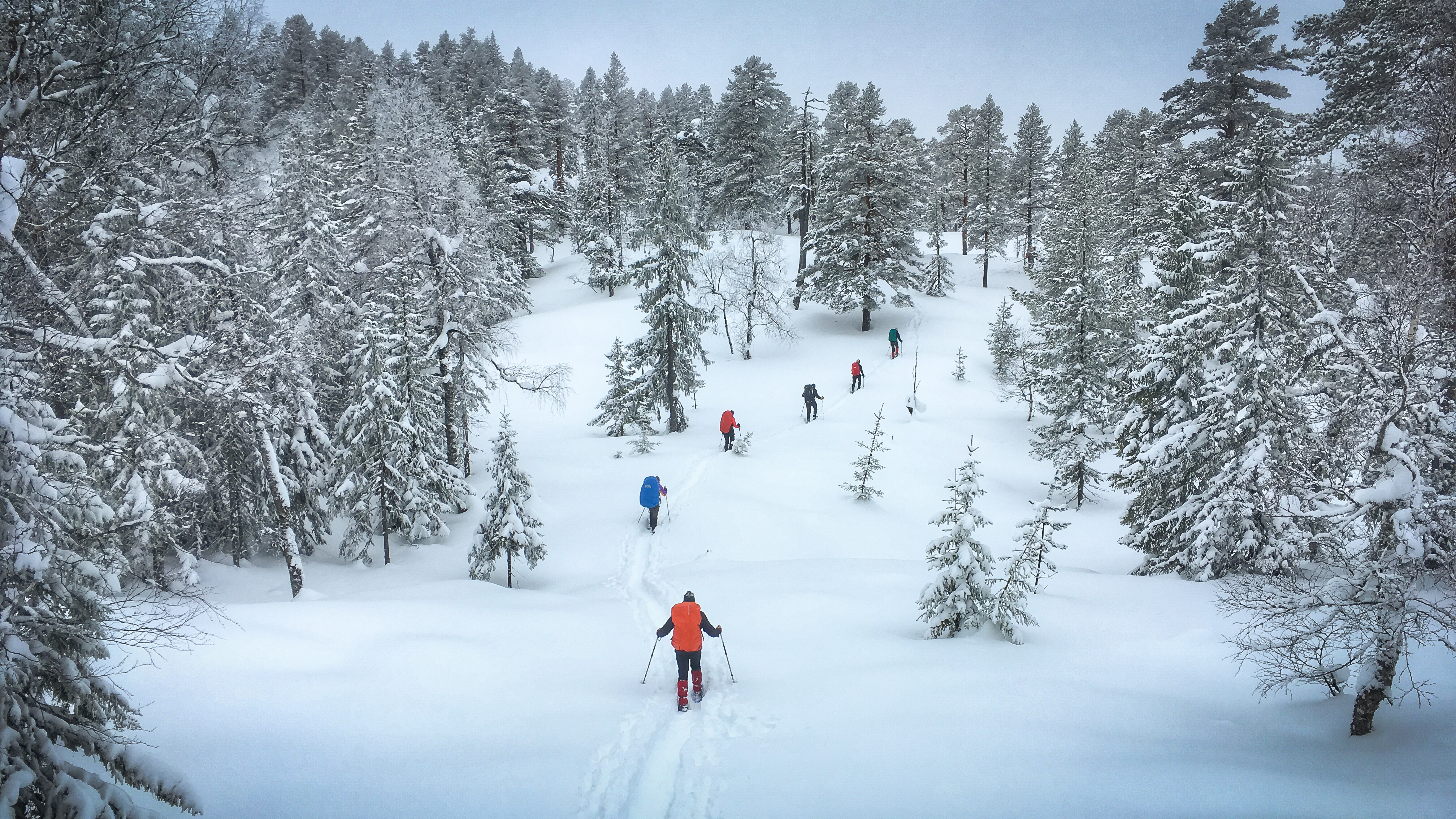 Een survival trektocht door de Scandinavische wildernis in de winter.